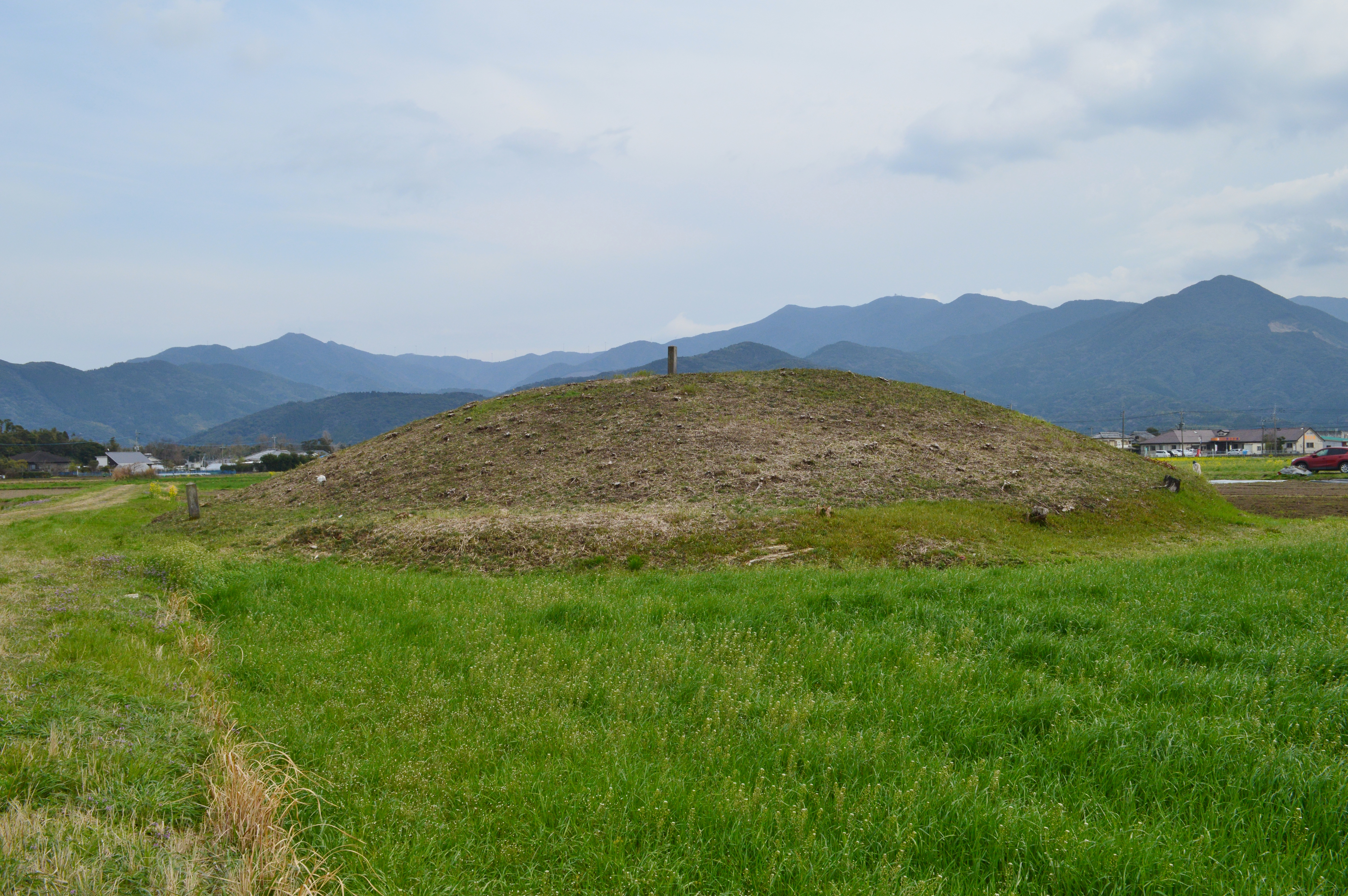 唐仁33号墳 墳丘全景